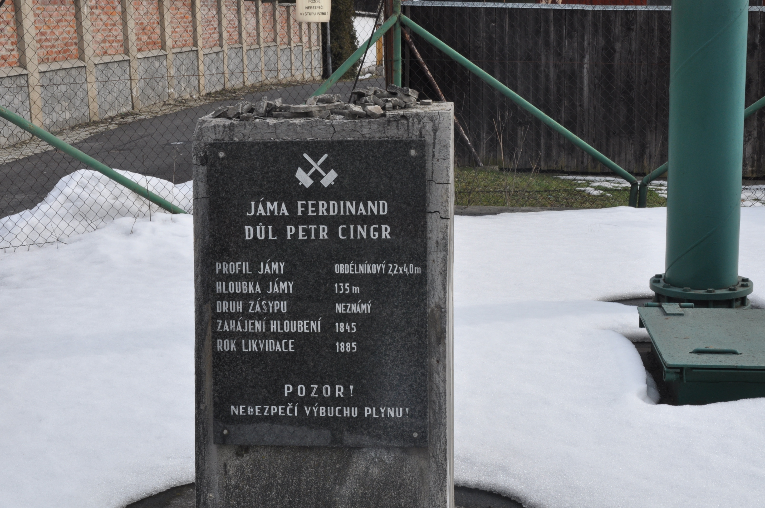 Náhrobní kámen označující místo, kde byl důl Ferdinand v Ostravě-Michálkovicích. Detail.